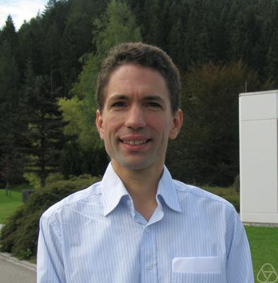 Foto di Valentin Blomer